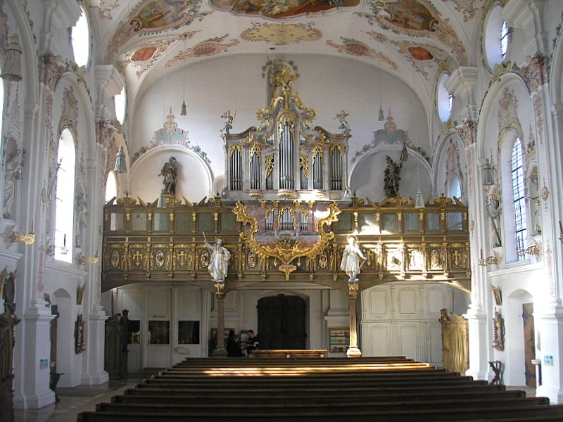 Wallfahrtskirche Maria Hilf (Klosterlechfeld, Landkreis Augsburg, Bayerisch-Schwaben). Langhaus, Blick zur Orgel. Eigene Aufnahme, Okt. 2006 / Pilgrimage Church Klosterlechfeld near Landsberg am Lech, Bavaria, Germany. Interior, looking to the organ. Own photo, Oct. 2006